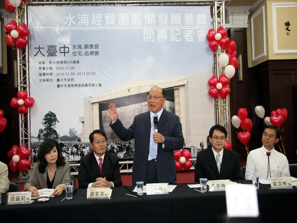 中文（台灣）: 臺中市水湳經貿園區開發願景館開幕記者會，臺中市市長胡志強（站立者）發言。